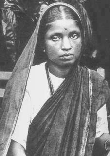 रमाबाई आंबेडकर, डॉ. बाबासाहेब आंबेडकर यांच्या पत्नी